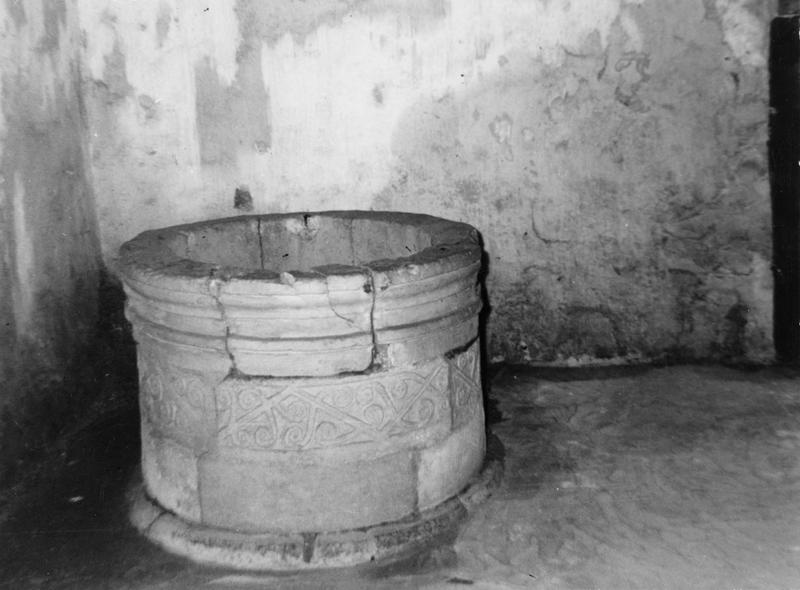 Taufbecken in der Krche St-Pierre in Courpignac